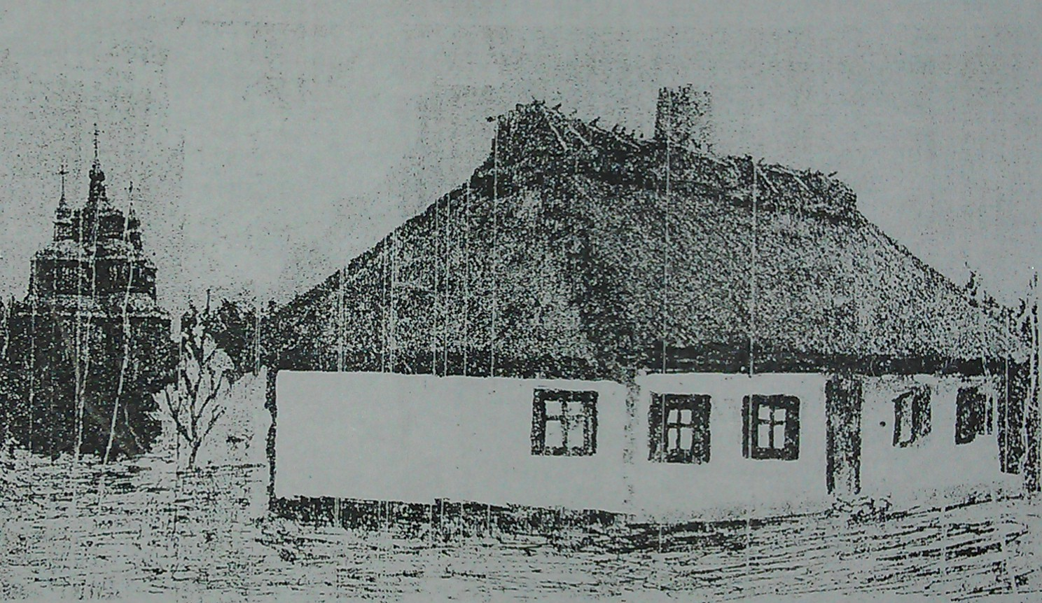 Церква у селі Вівсяники Літинськього повіту 1732-1919 роках